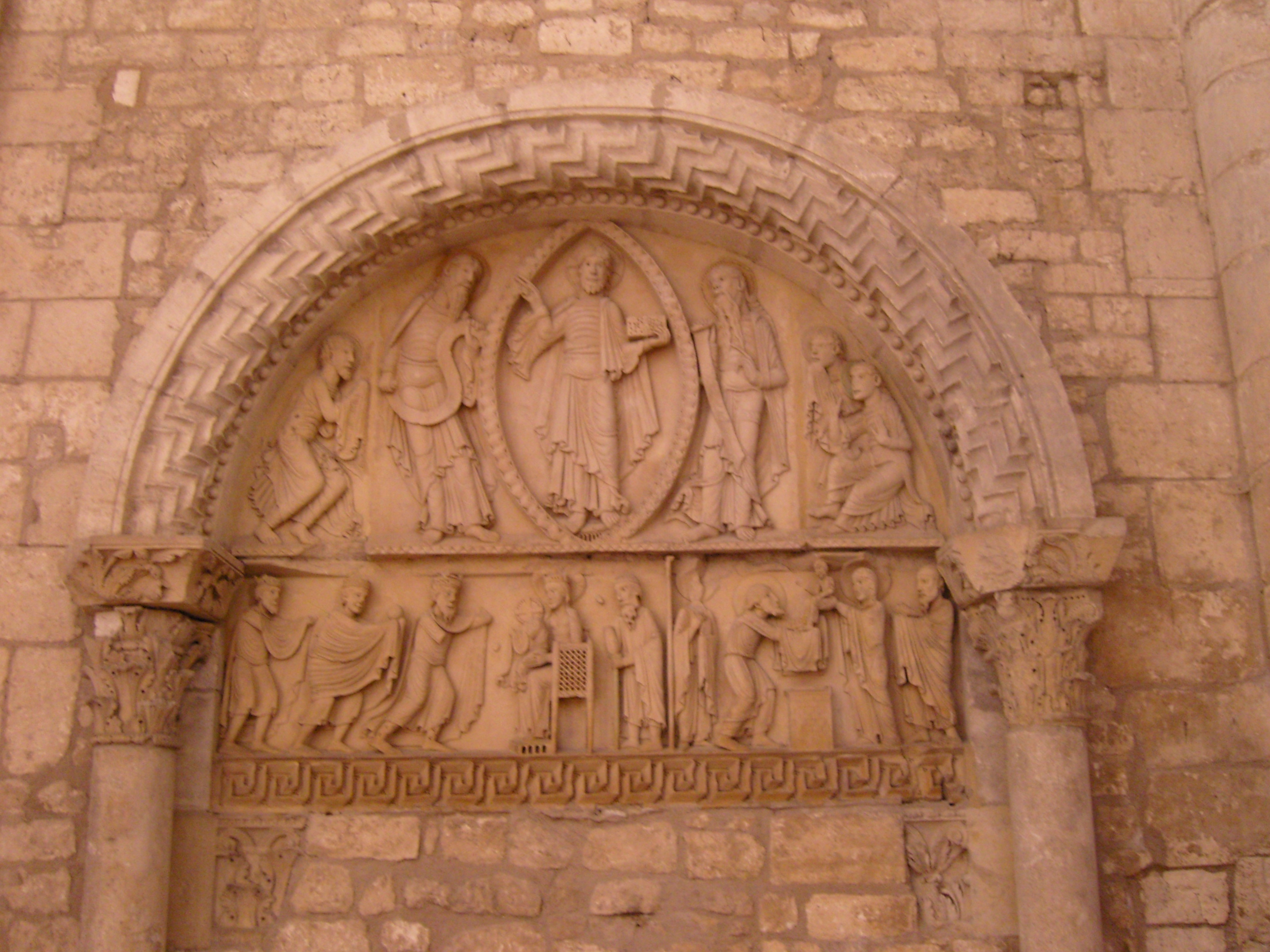 Tympanon im süd. Querschiff von Notre Dame de La Charité